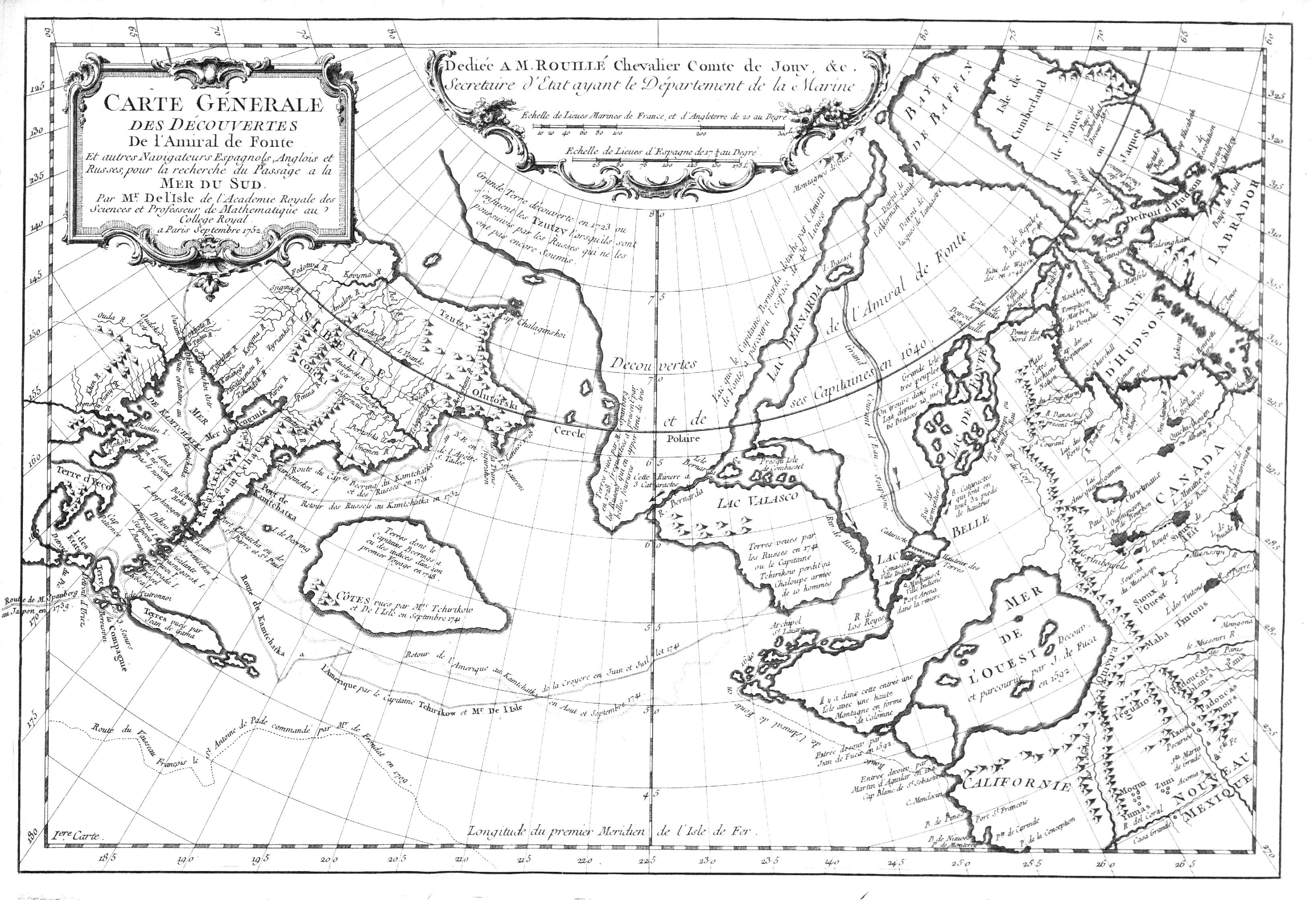 Aus: Joseph Nicolas Delisle / Bartolomé Fuentes, Nouvelles Cartes des Decouvertes de l'Amiral de Fonte, Et autres Navigateurs Espagnols, Portugais, Anglois, Hollandois, François [et] Russes, dans les Mers Septentrionales, avec leur Explication, Paris 1753